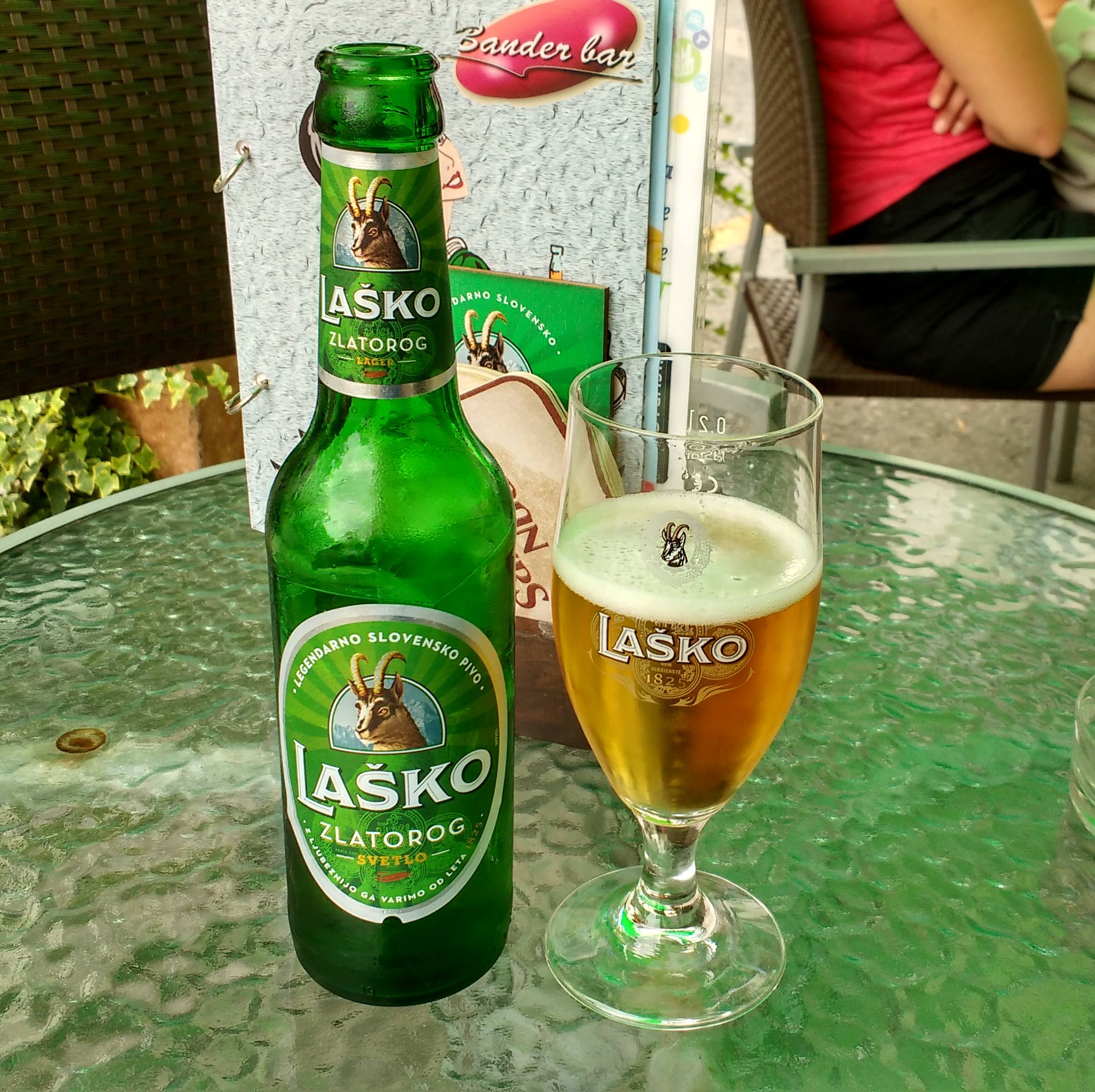 Koper, Eslovênia